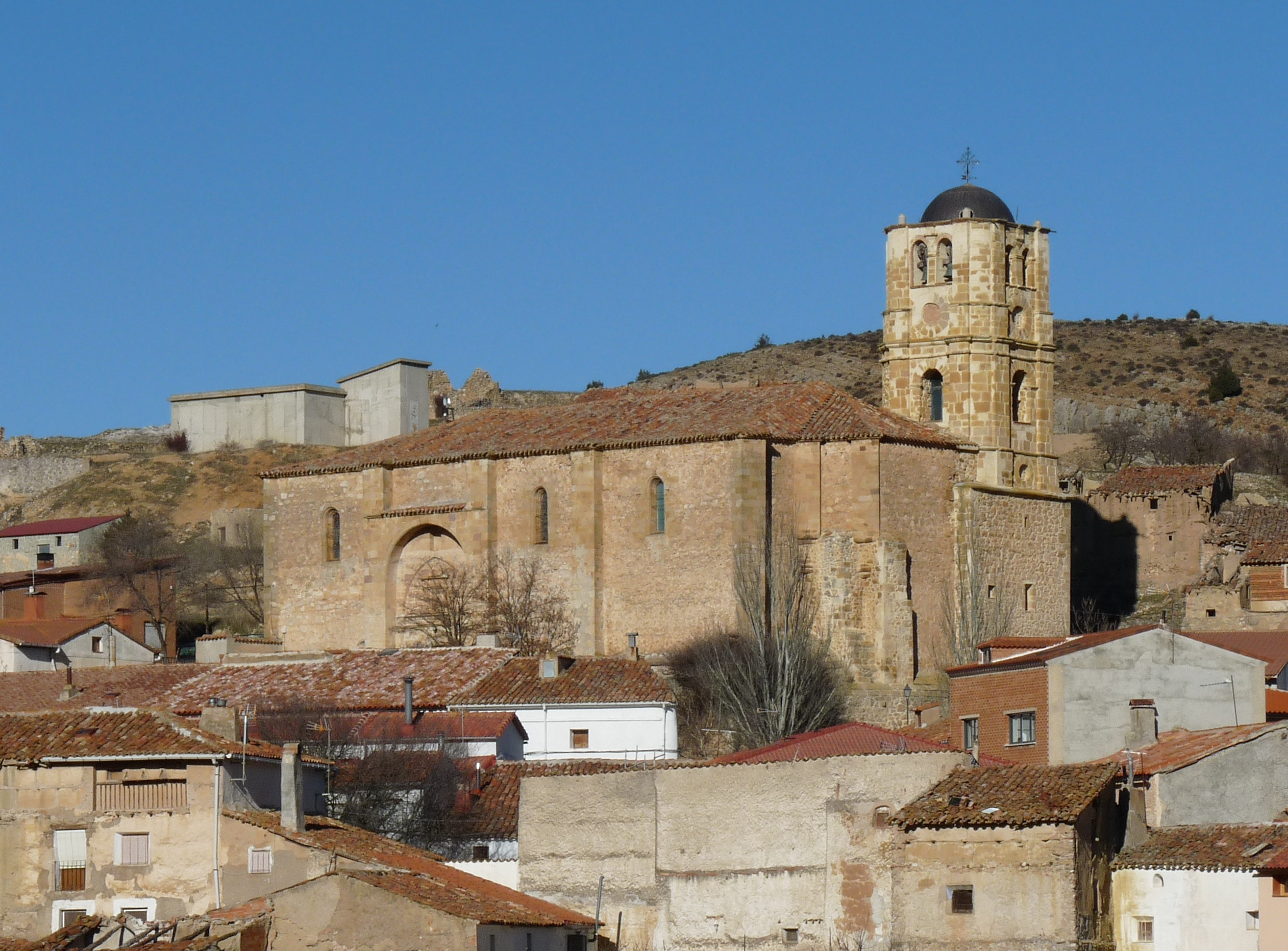 Ciria - Iglesia de Santa María la Mayor - Vista